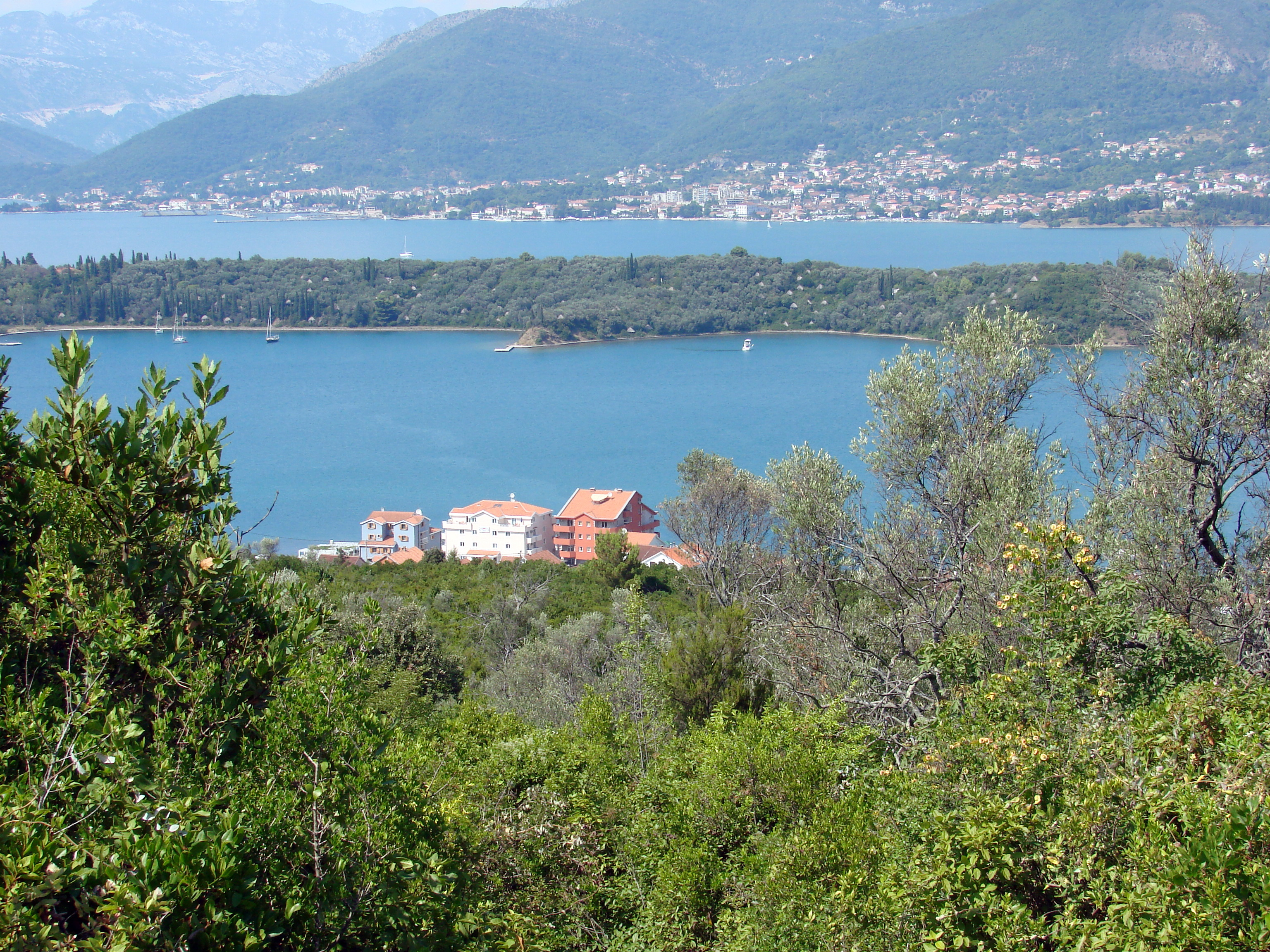 Radovici, Ostrvo cveca i Tivat